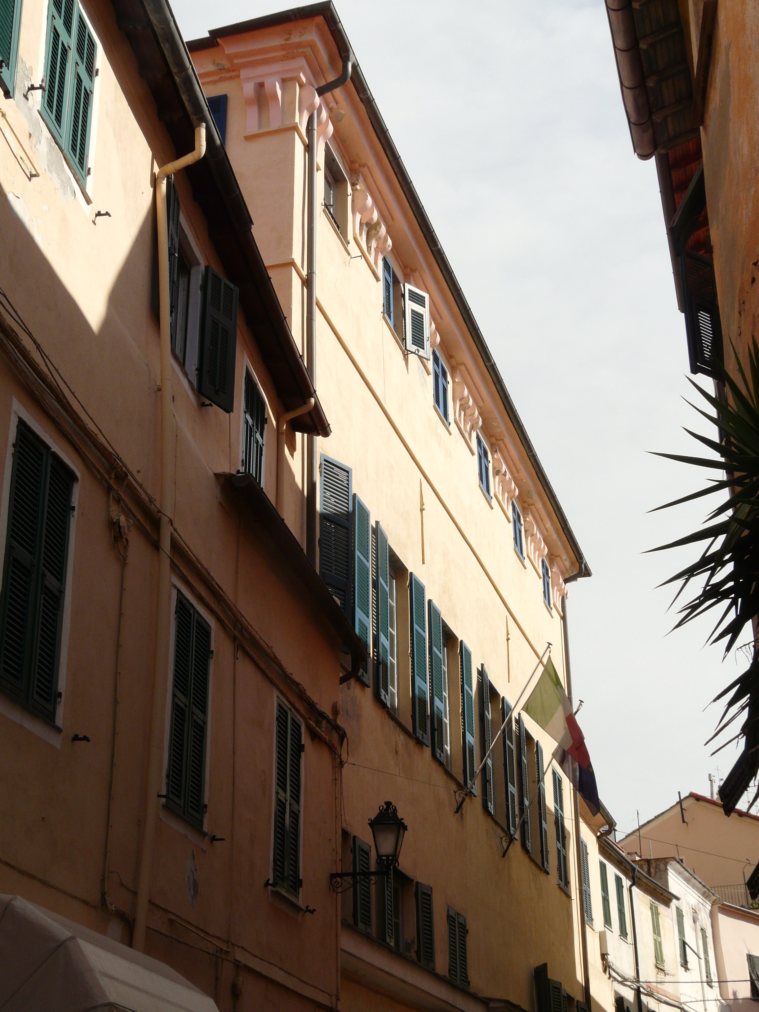 Municipio di Riva Ligure, Liguria, Italia